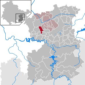 Wernburg in Thuringia - Saale-Orla-Kreis